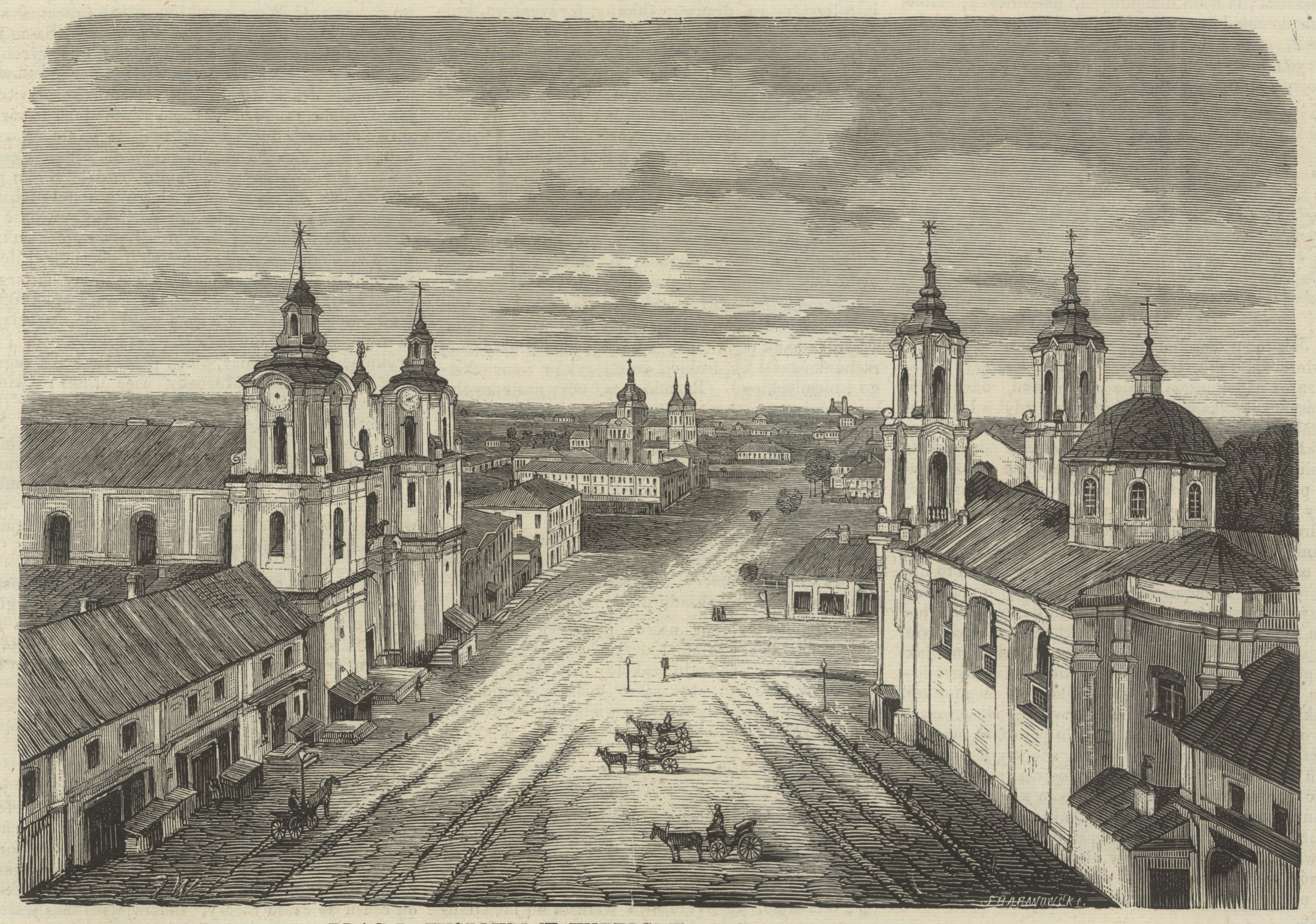 Беларуская (тарашкевіца): Віцебск (Viciebsk), пляц Рынак (plac Rynak)